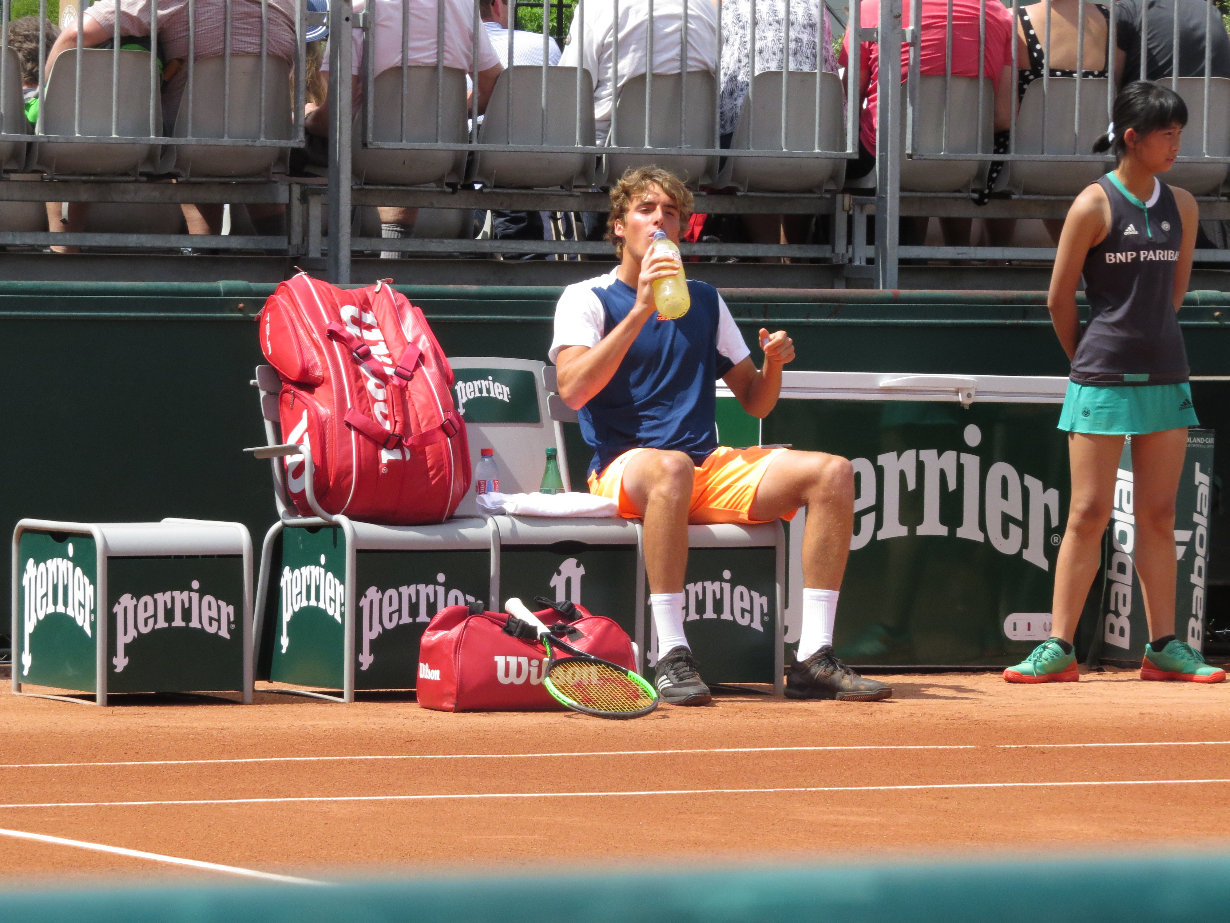 Stefanos Tsitsipas lors de son deuxième tour des qualifications face à Gleb Sakharov (court n°14)